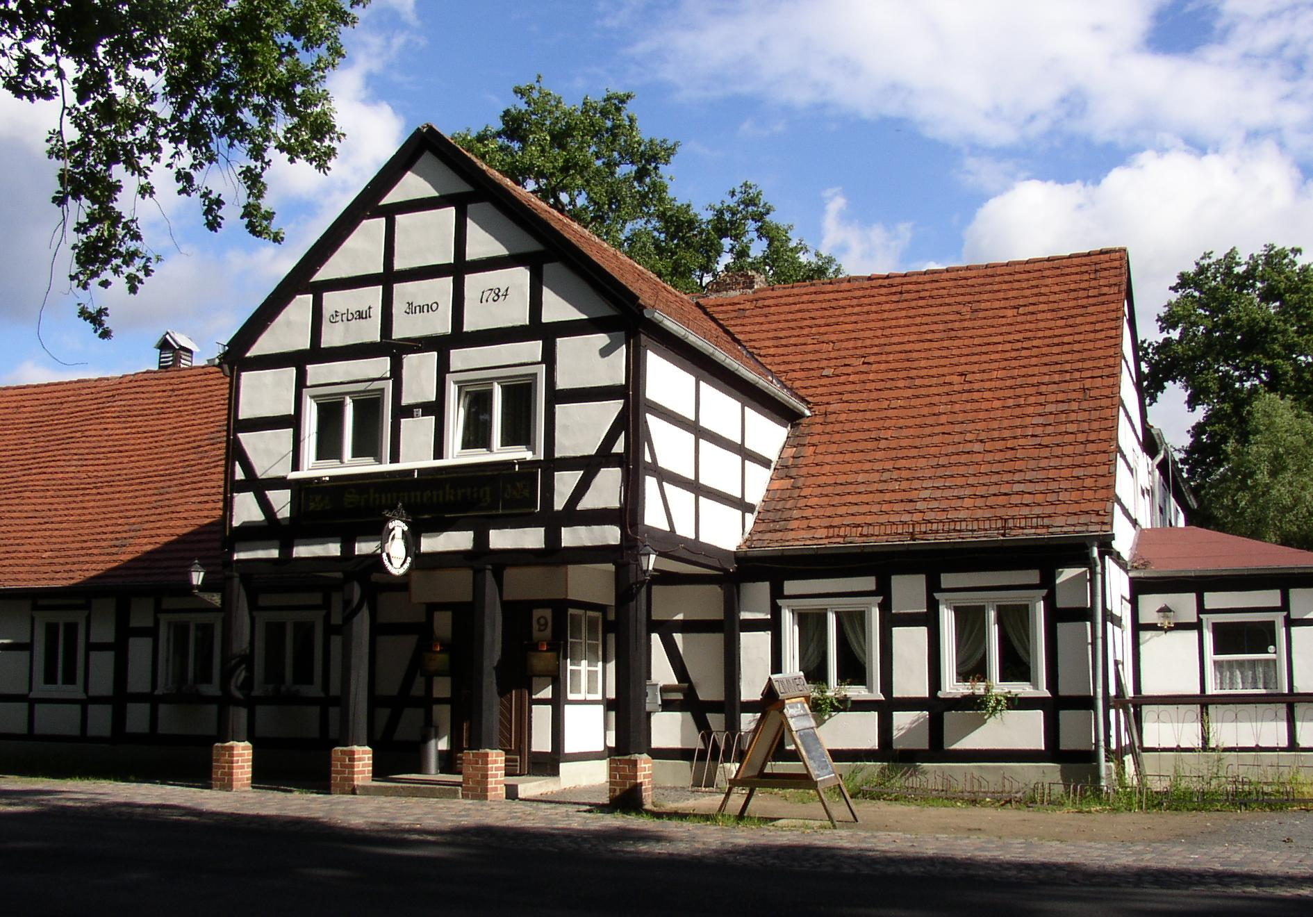 Vorlaubenbaus „Schwanenkrug“ (von 1784, Berliner Allee 9) in Schönwalde-Siedlung (Gemeinde Schönwalde-Glien) in Brandenburg, Deutschland